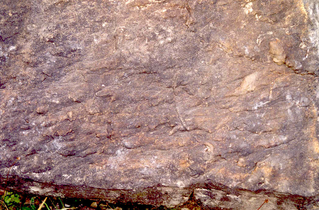 moule dans la base d'une séquence turbiditique, en Ariège (42°55'10.08"N 1°41'16.54"E) [1]